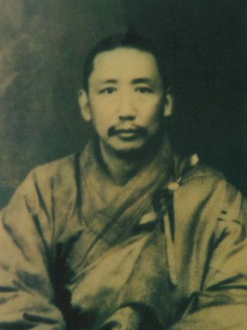 能海上师（1886年1月20日－1967年1月1日），俗名龚学光，字缉熙，又字阔初，藏传佛教高僧。图为1924年，刚刚出家的能海上师。